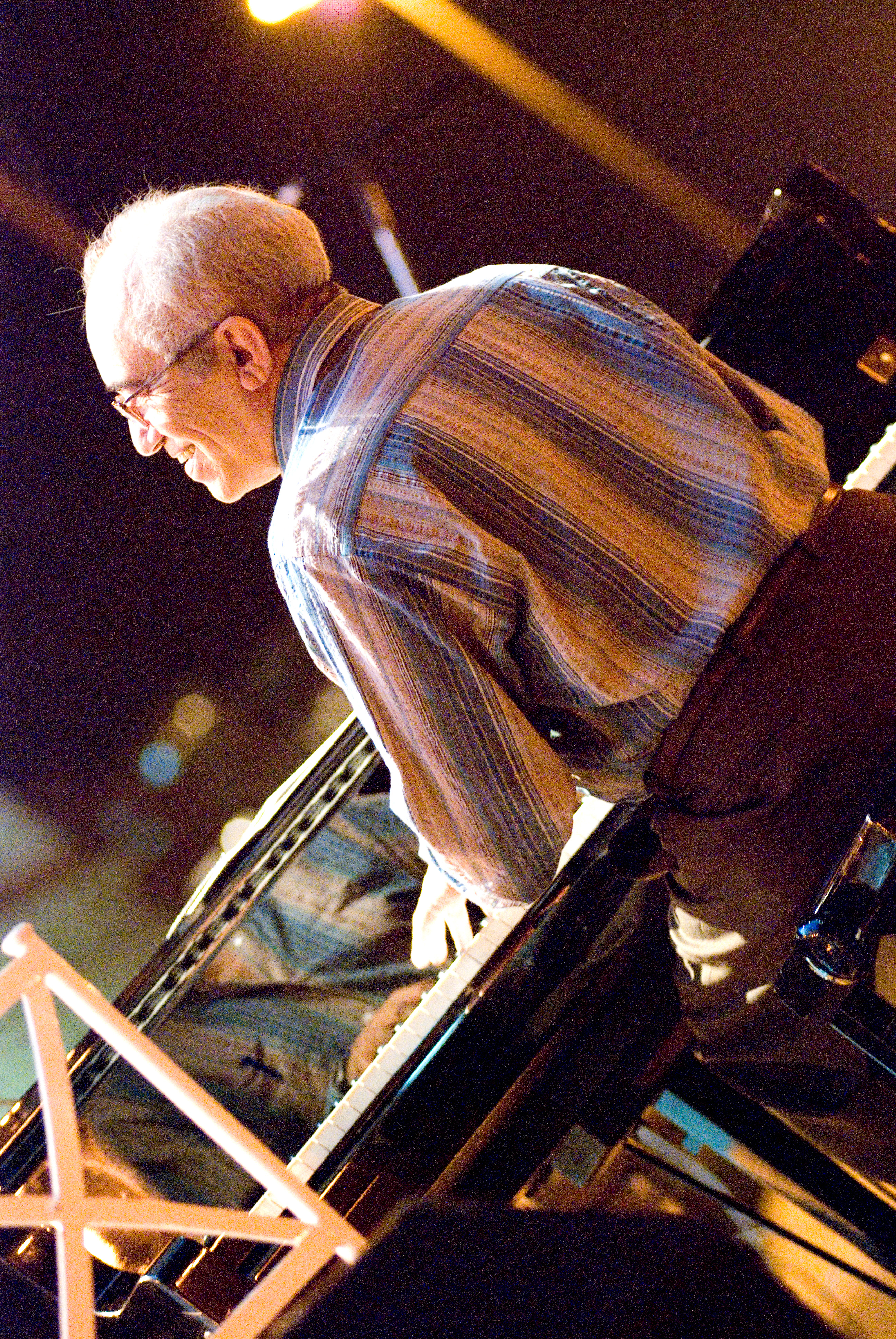 Foto: Silvio Tanaka.